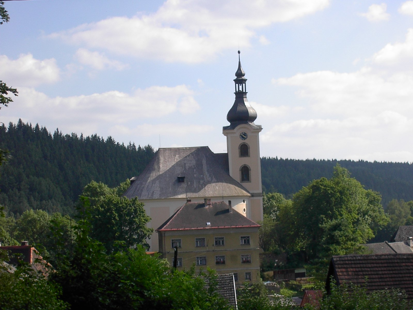 Church in village Utery, Czech Republic. Úterský kostel v pohledu od západu.